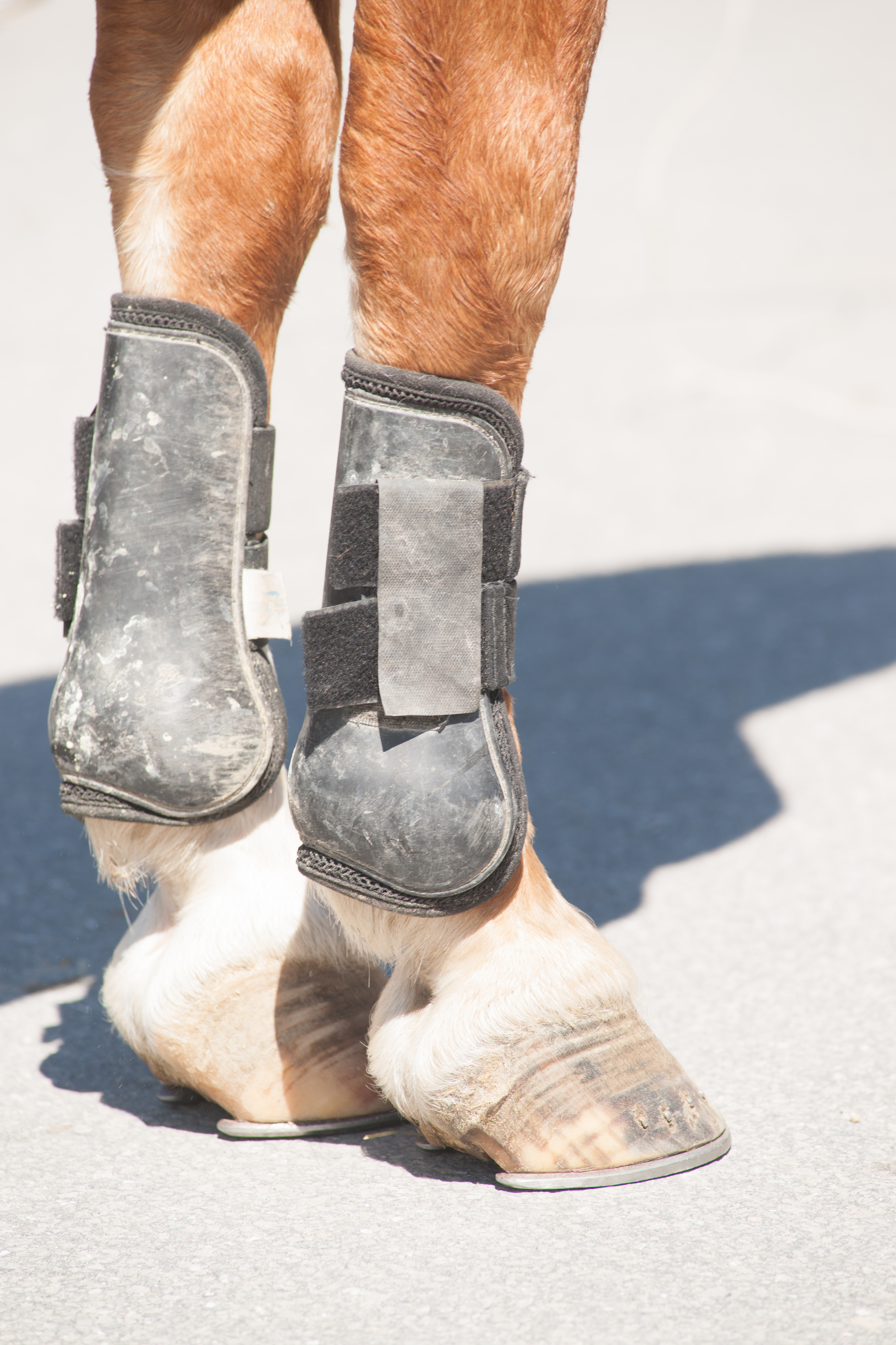 Jambes d'un Franches montagnes au Haras national d'Avenches, Suisse.